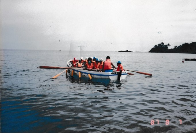 カッターを使っての海洋プログラムの様子。